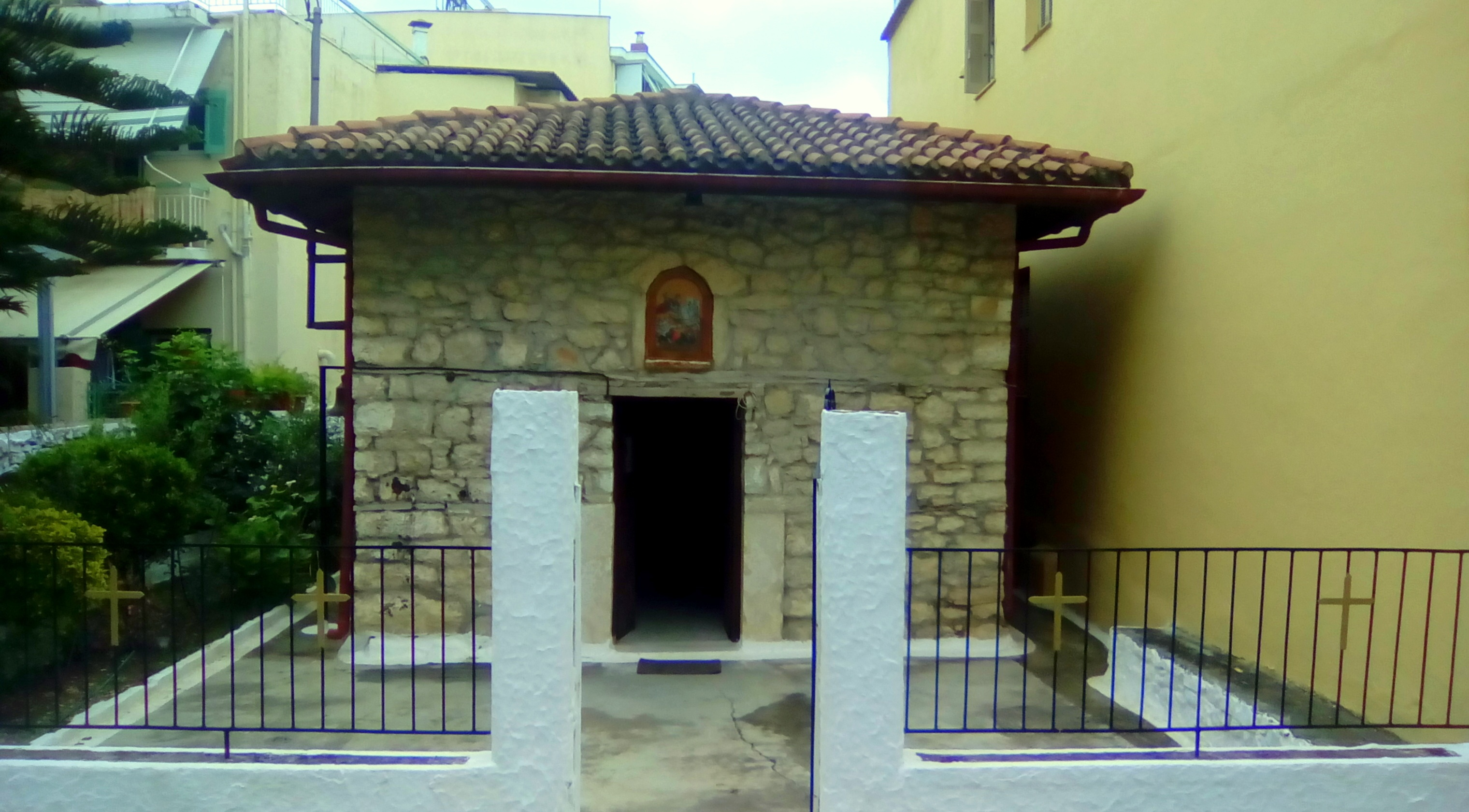 Ο ναός του Αγίου Γεωργίου Μπατζή, Άρτα, Έλλαδα.